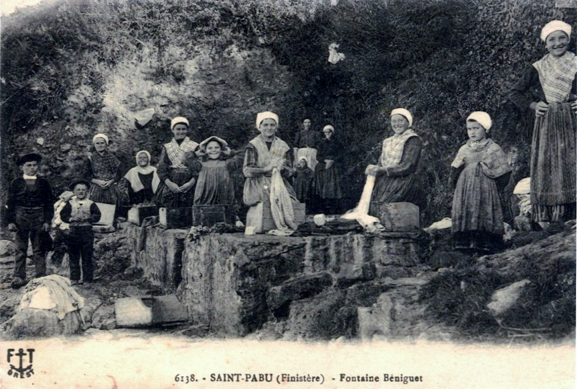 Le lavoir de Beniguet en Saint-Pabu vers 1920 (carte postale).